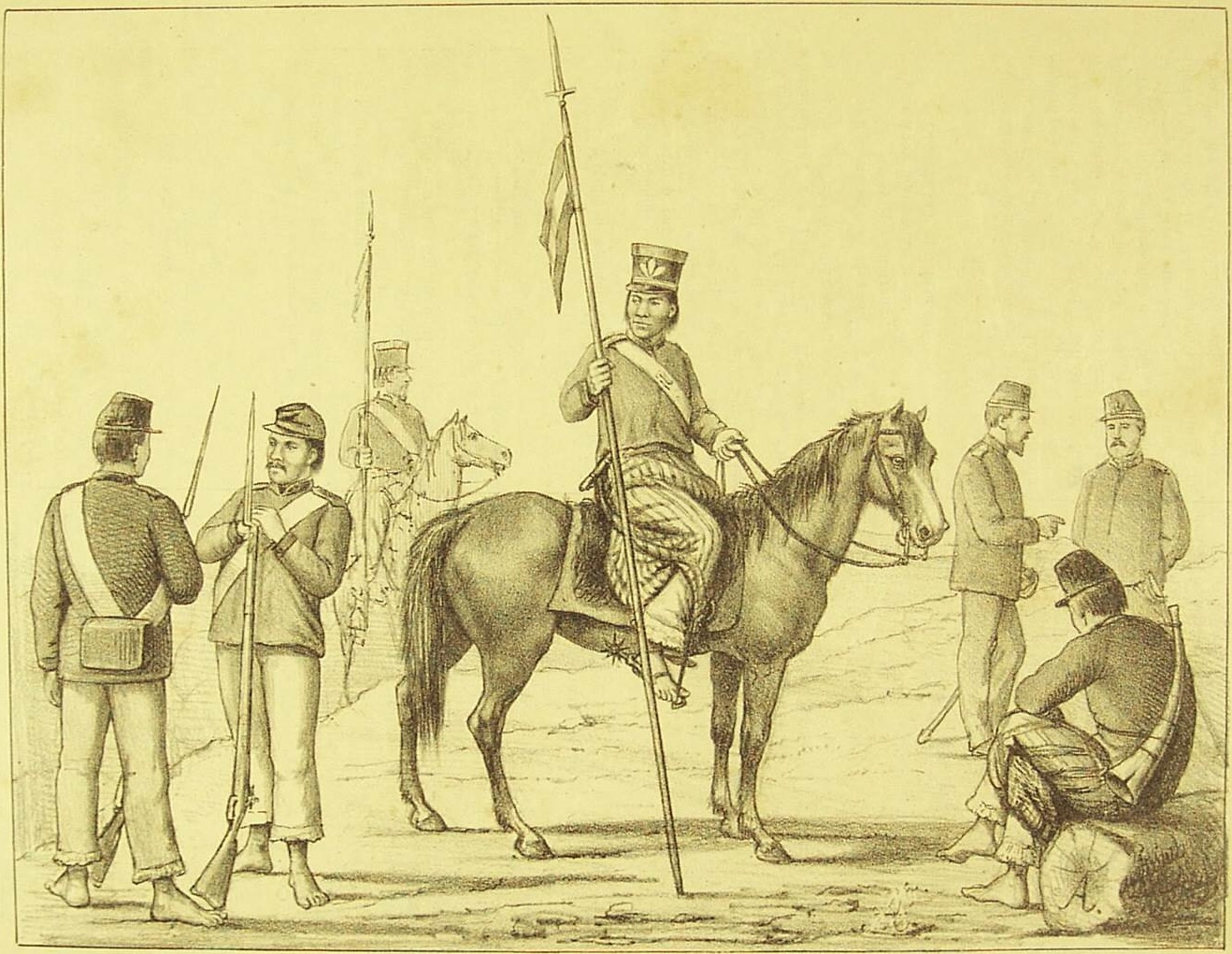 Uniformes da cavalaria e infantaria do exército paraguaio durante a Guerra do Paraguai.